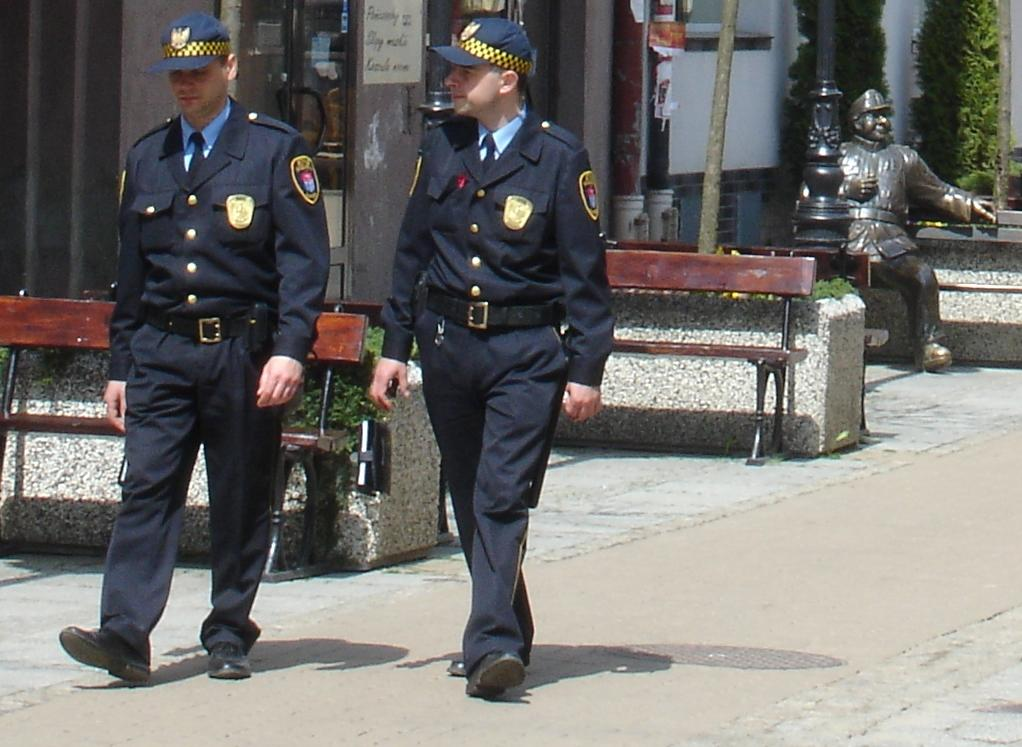 sanok local police